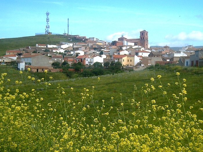 Mestanza partial view